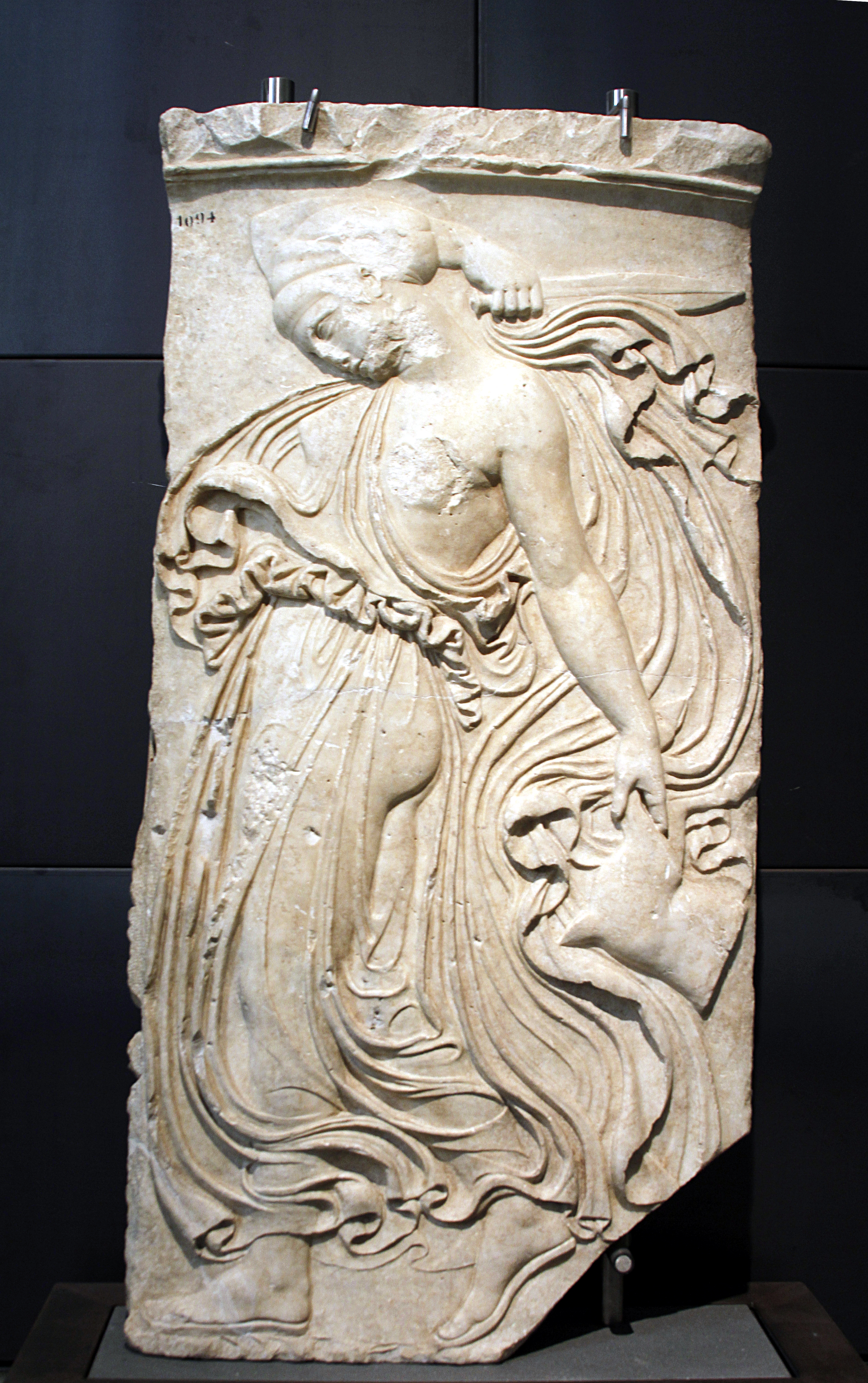 Palazzo dei Conservatori - Musei Capitolini - Rome